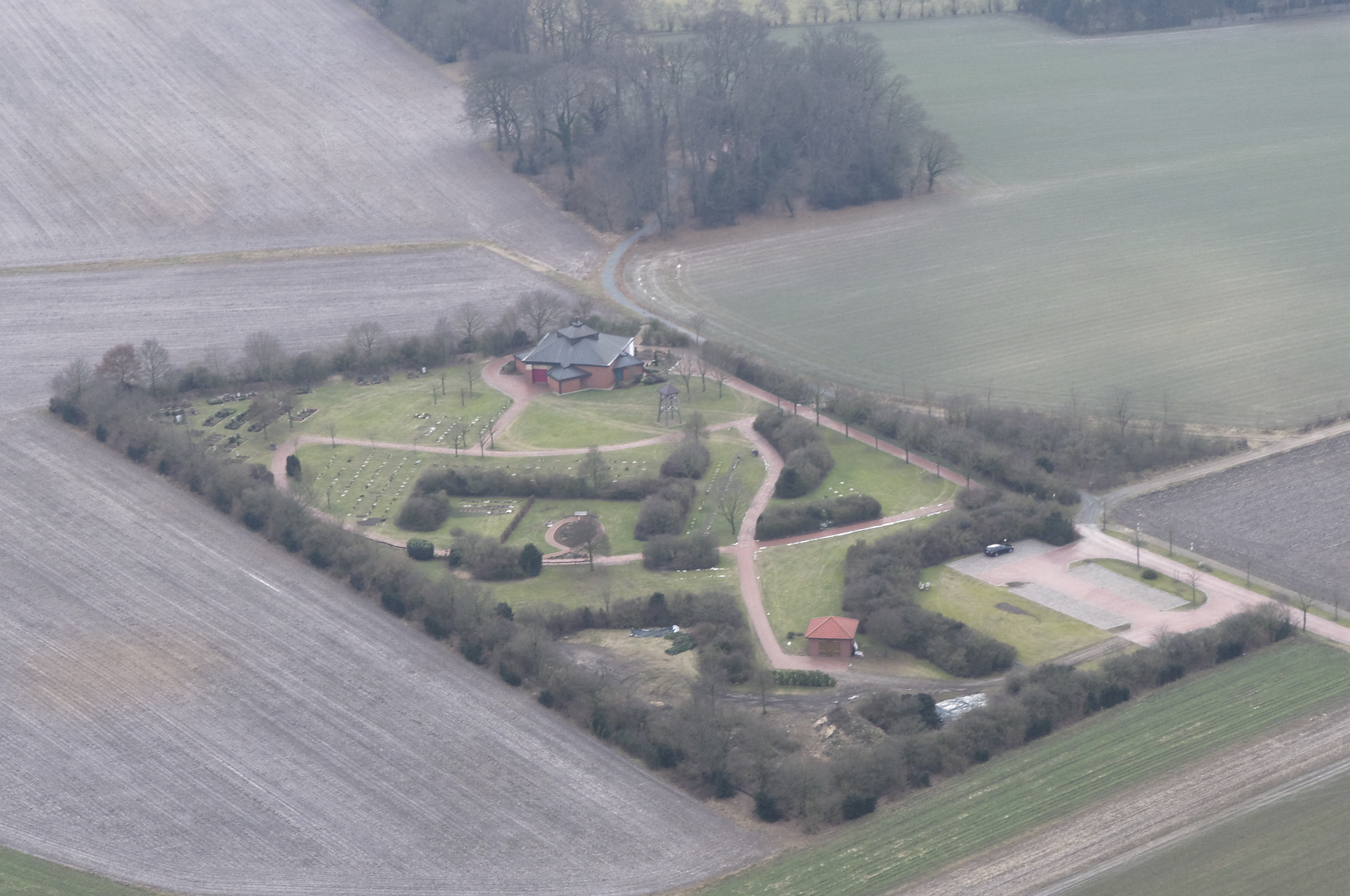 Luftaufnahme: ein Friedhof in der Gemeinde Schwanewede